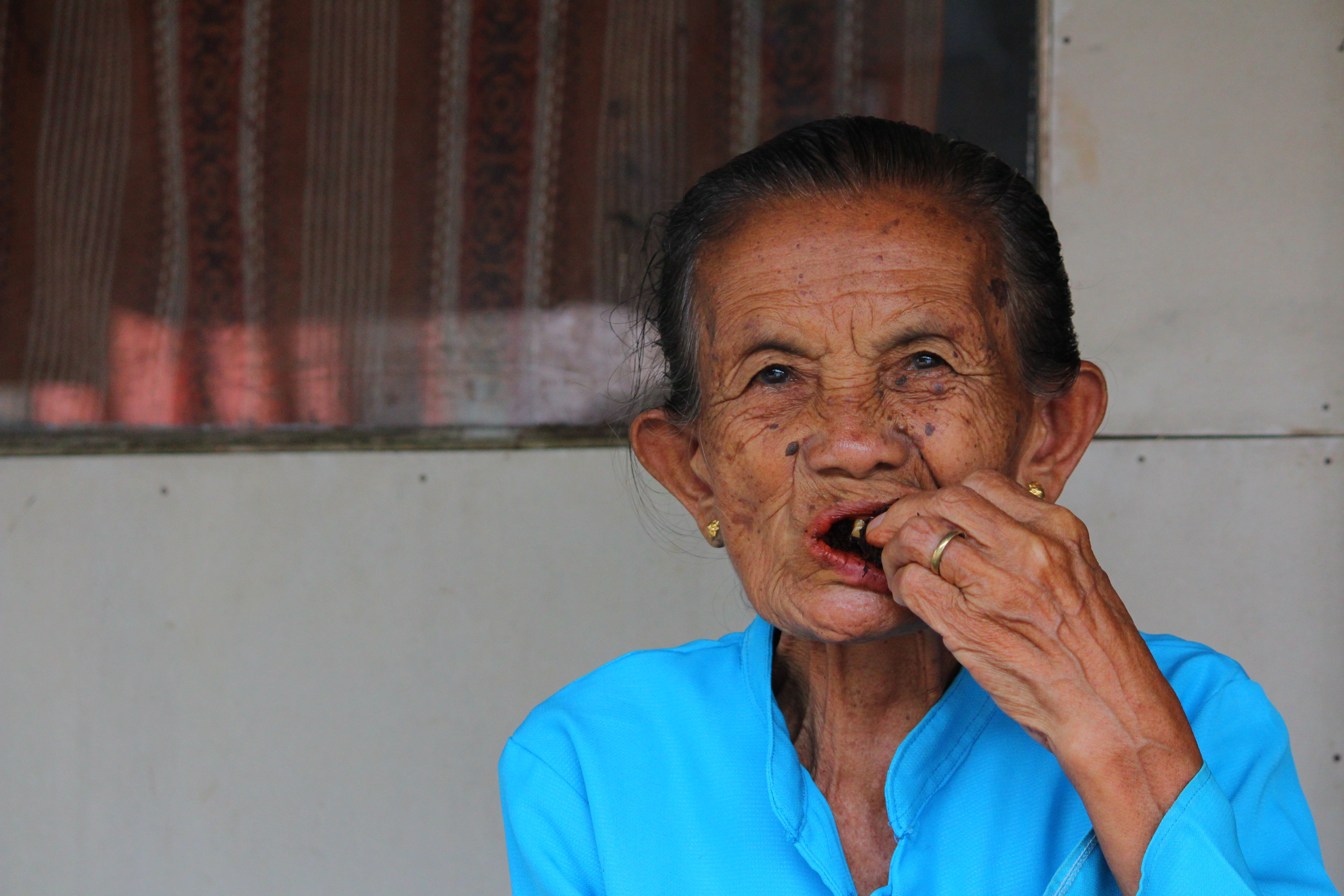 Nyisig atau Nginang adalah tradisi makan sirih. Biasanya, sebelum dimakan sirih diramu terlebih dahulu dengan tembakau, kapur, gambir, dan buah pinang. Pada jaman dahulu, dalam tradisi jawa kuno mengunyah daun sirih hijau wajib hukumnya, terutama bagi kaum perempuan.